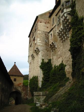 moje fotka, 2004